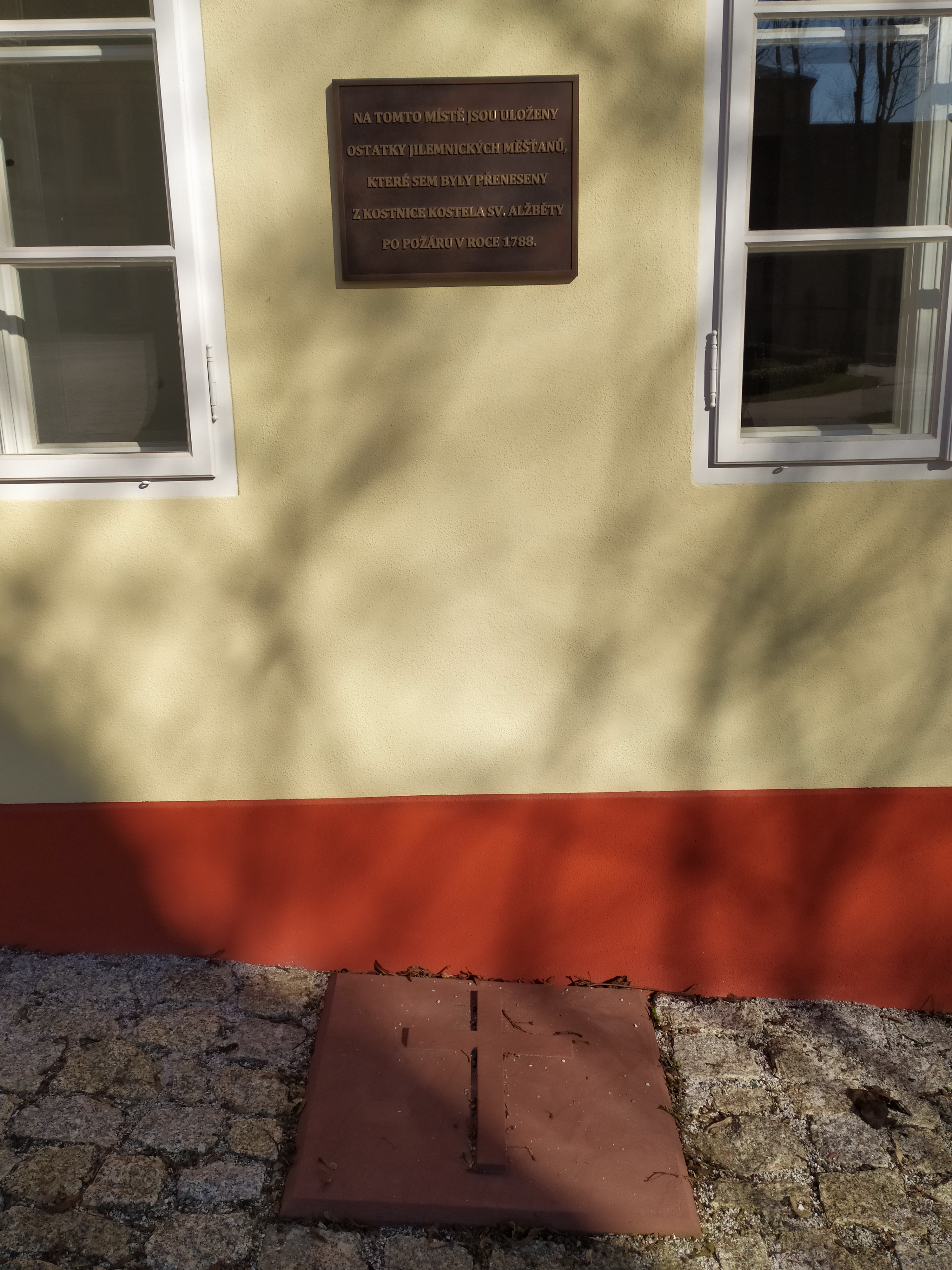 pamětní deska na zahradnickém domku v zámeckém parku